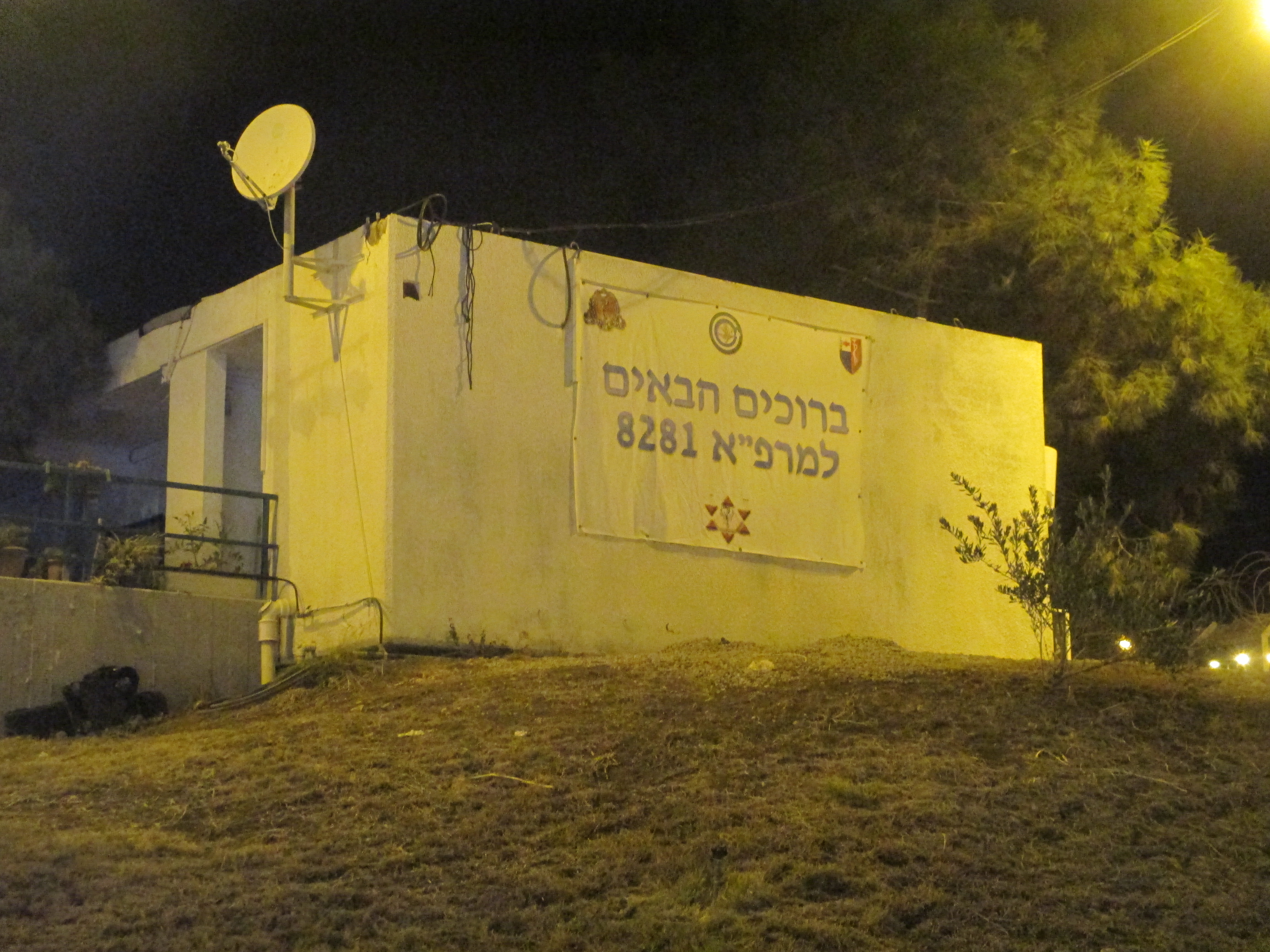 בסיס מרפ"א צפון בחיפה